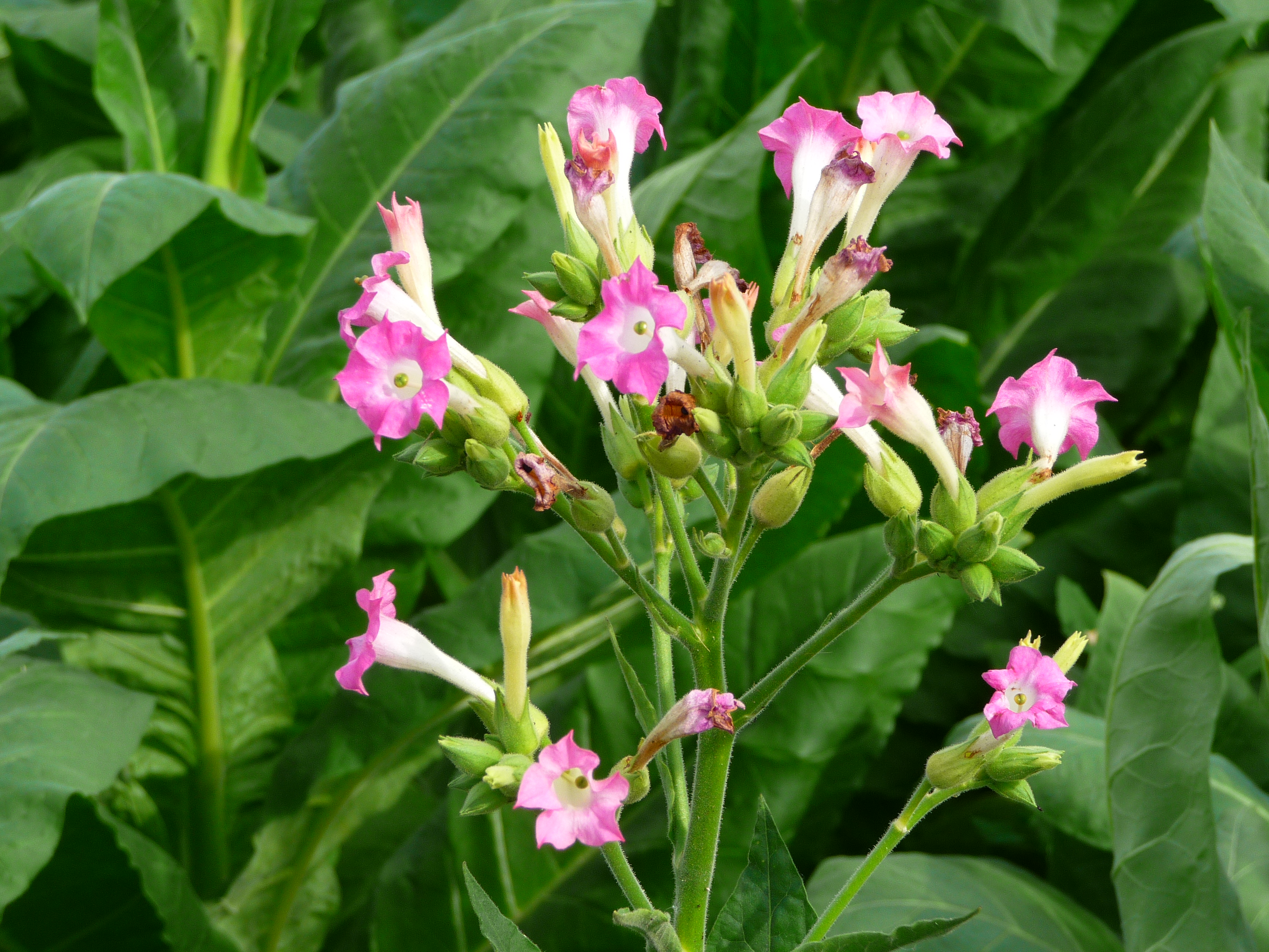 Tabakblüte